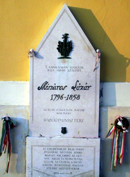 Mészáros Lázár emléktábla a bajai Szent-rókus kápolnán